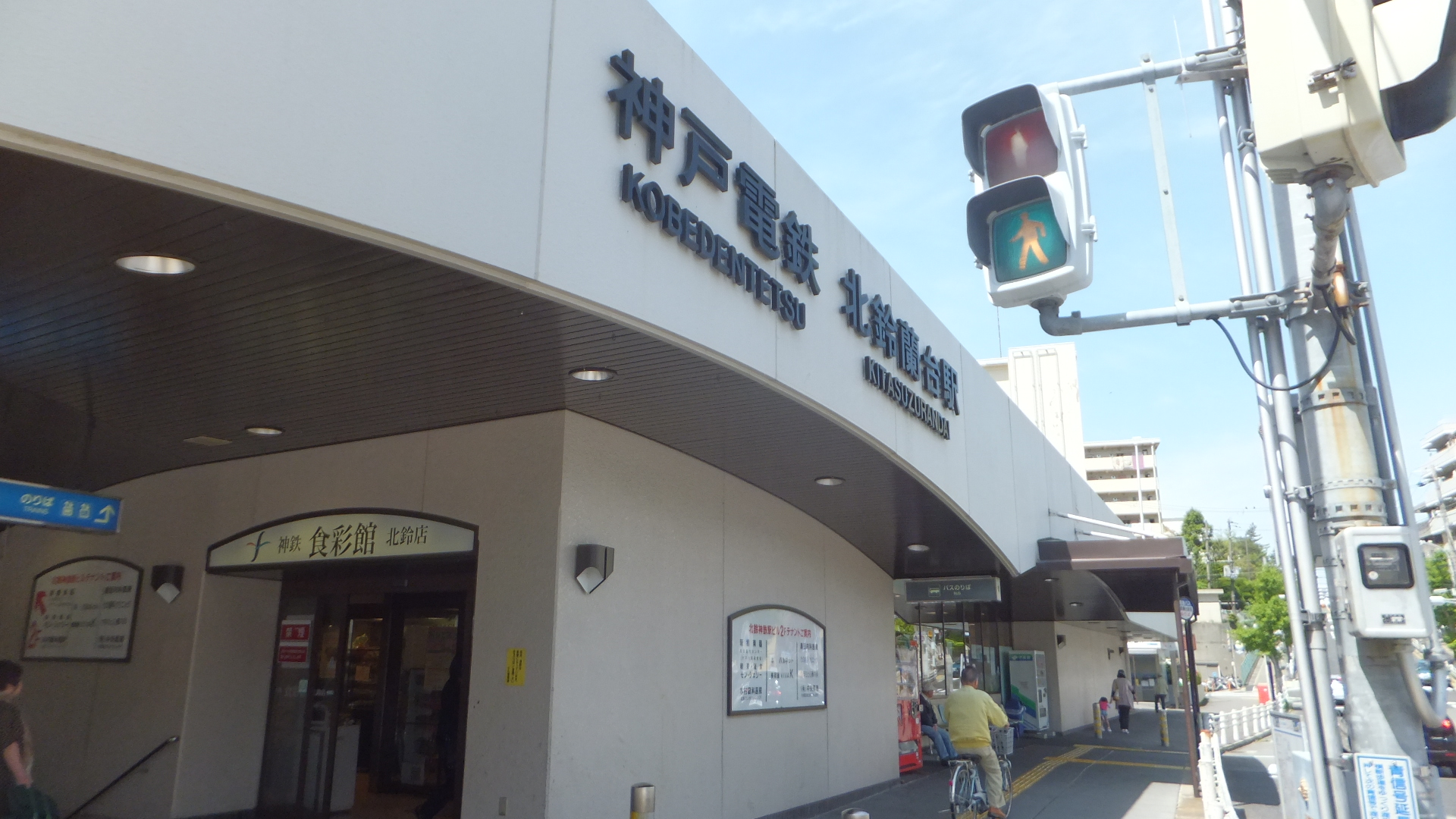 北鈴蘭台駅（2014年5月4日）